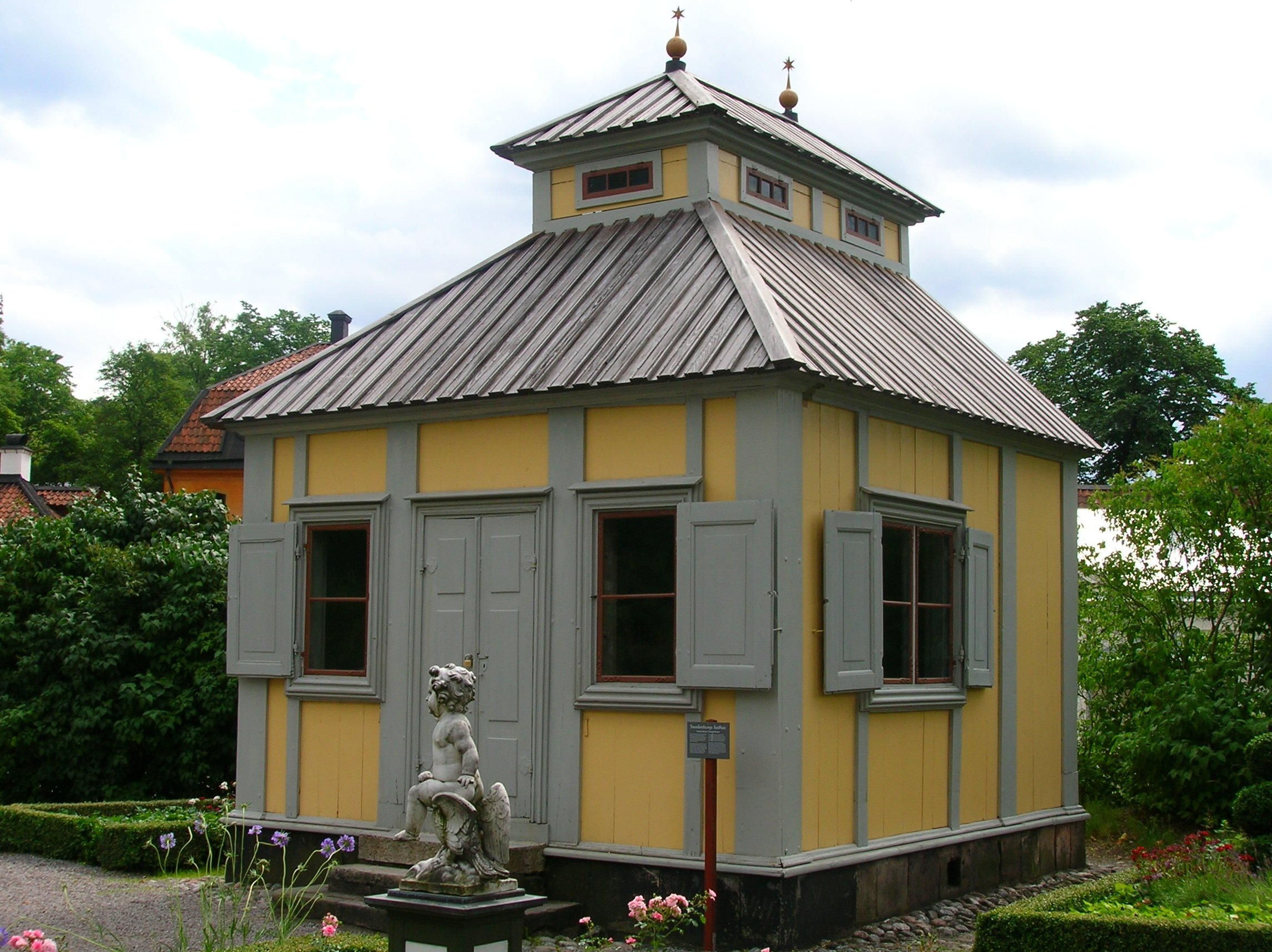 Emanuel Swedenborgs lusthus, Skansen, Stockholm, Sweden.